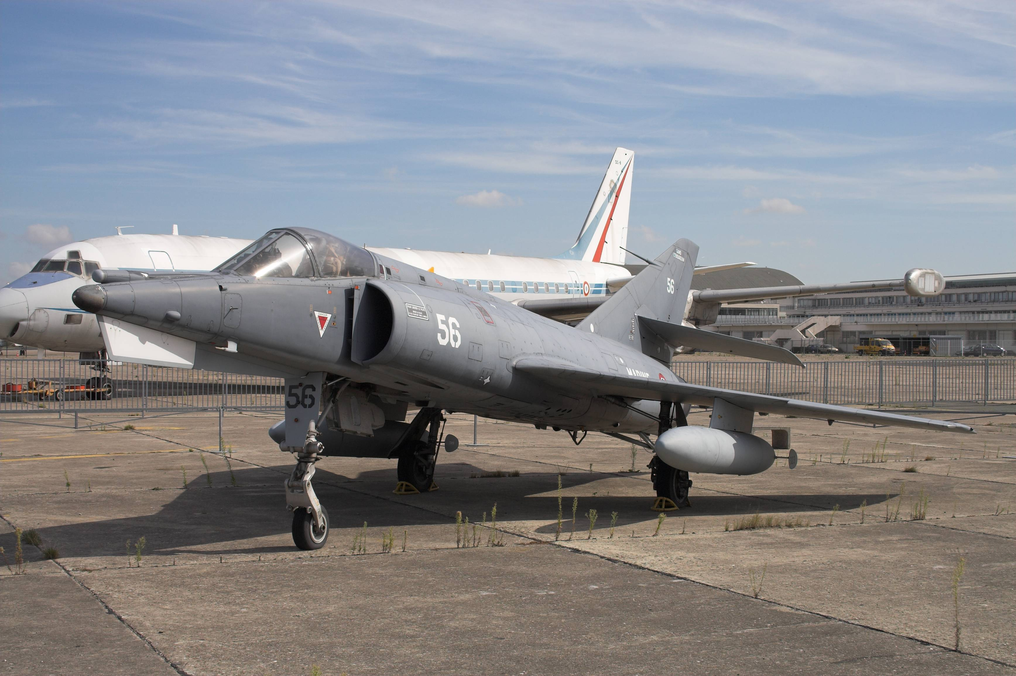 Dassault Etendard in the Museum of Air and Space(Musée de l'air et de l'espace, Le Bourget, France)